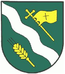 Wappen der Gemeinde Sankt Johann im Saggautal, Steiermark